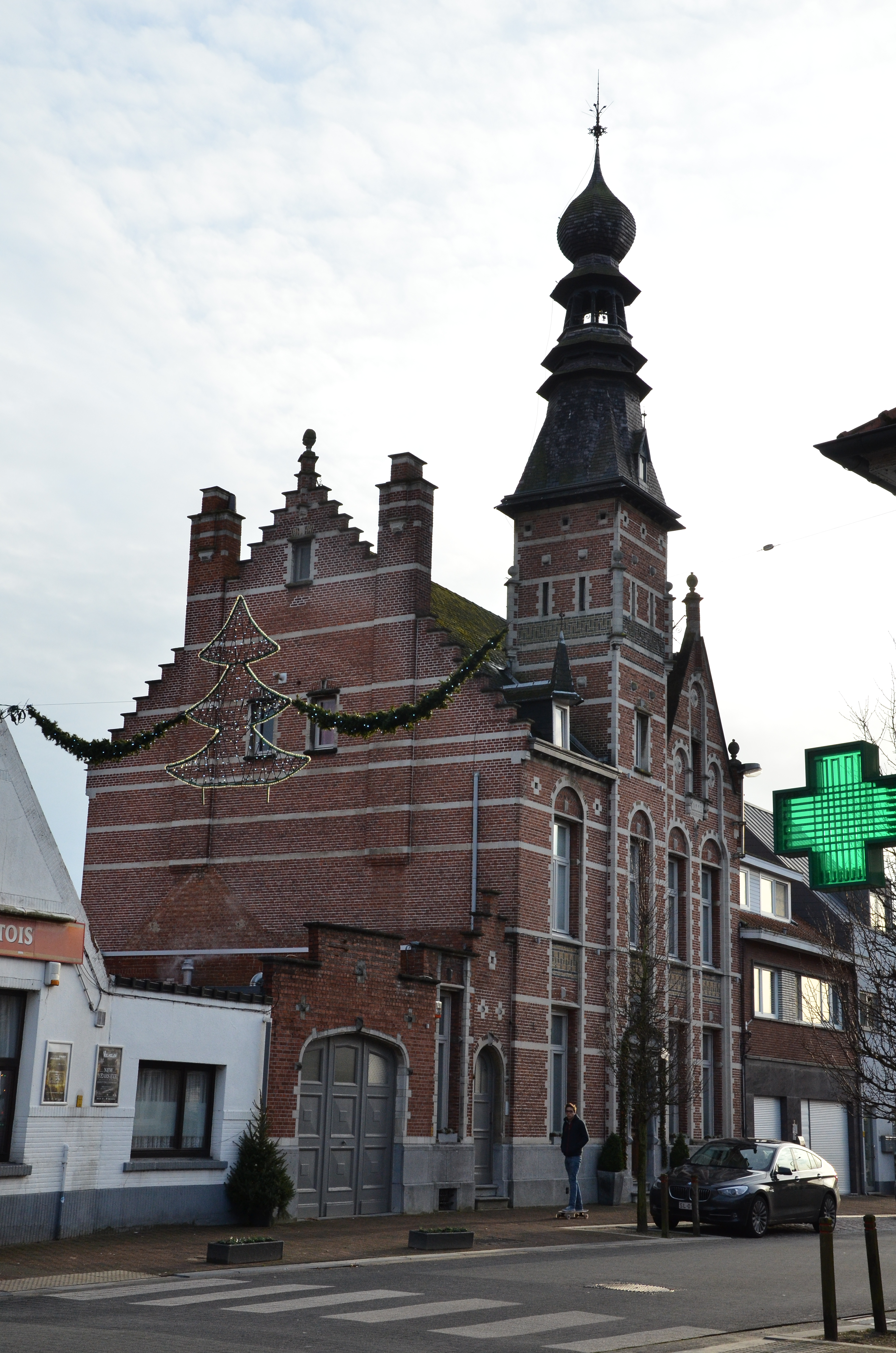 Herenhuis, Liersebaan 2, Zandhoven